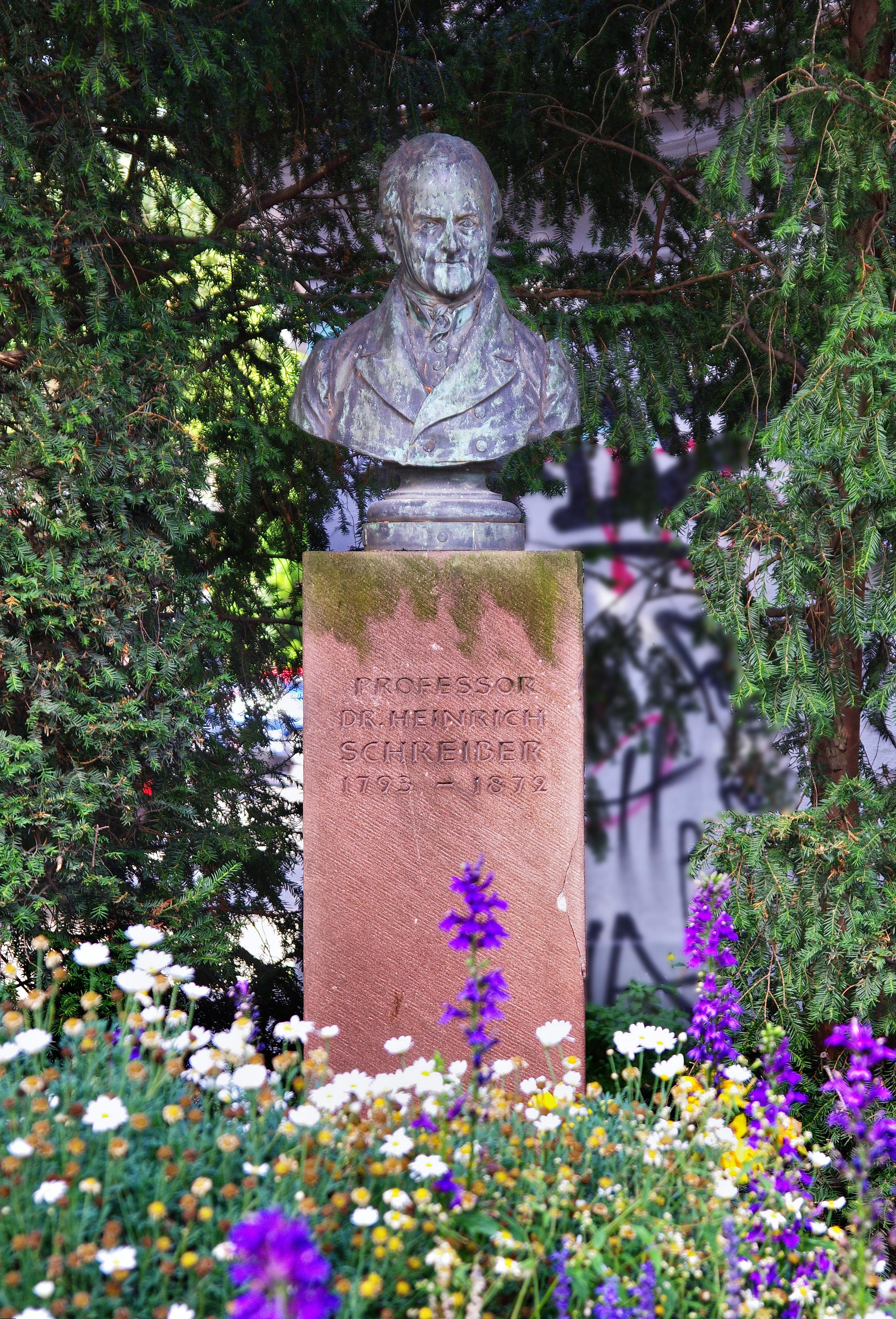 Die Büste von Heinrich Schreiber an der Günterstalstraße